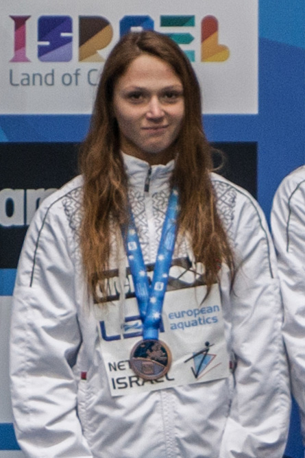 השחיינית אלכנסדרה הרסימניה עם מדליית הארד בה זכתה במשחה השליחים ל-50X4 מטרים מעורב מעורב באליפות אירופה בבריכות קצרות בנתניה, 2015